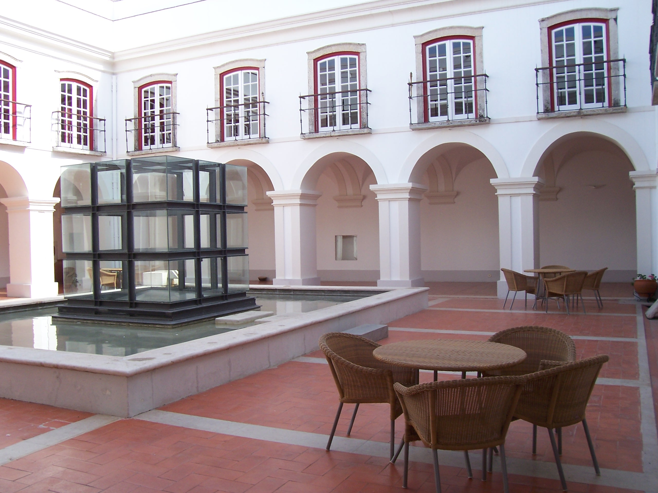 Pormenor do claustro da Pousada This file was uploaded for Wiki Loves Monuments in Portugal with the unique identifier 70159.